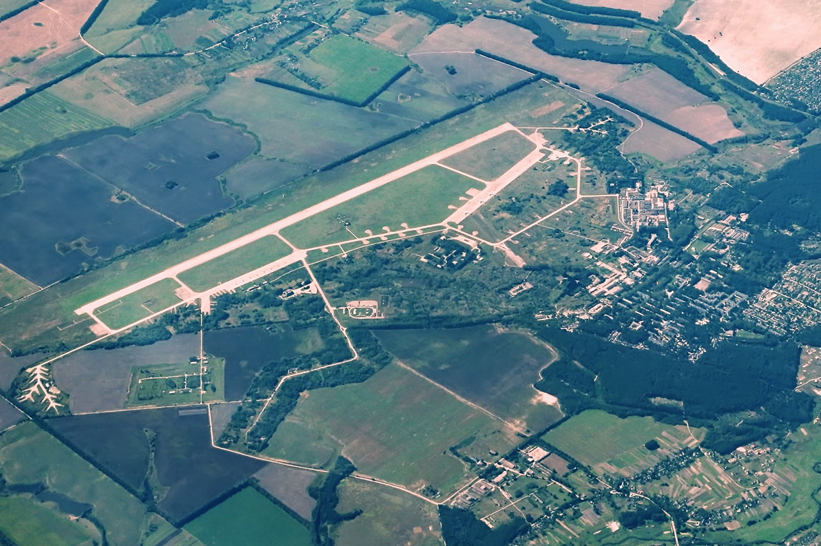 На нём, кроме самолётов гражданской авиации, дислоцируется 9-я бригада тактической авиации (в/ч А-2038). Боевой состав по состоянию на 1.04.2014. 6 МиГ-29 2 МиГ-29УБ 4 Су-27. Бортовые №№ 26, 38, 39, 53. 1 Су-27УБ. Бортовой № 69. Бывший 341 ТБАП, в/ч 27882. Код UKKO / УККО Coordinates: 50°9'52"N 28°44'26"E